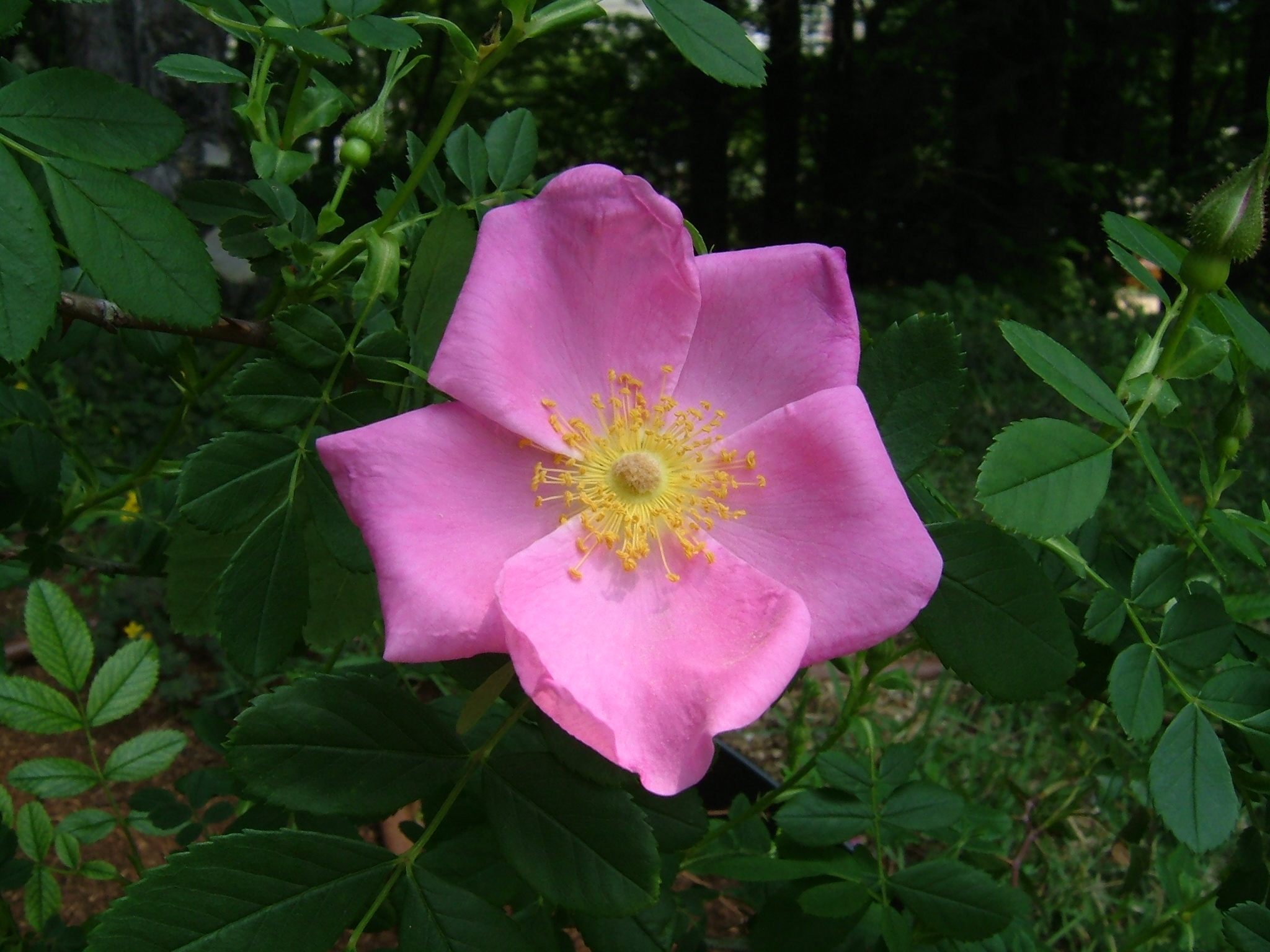 ロサ ウィルギ二アナ Rosa virginiana